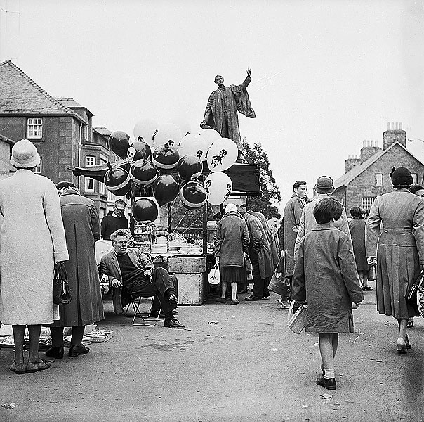 Teitl Cymraeg/Welsh title:Diwrnod Ffair yn y Bala Ffotograffydd/Photographer: Geoff Charles (1909-2002) Dyddiad/Date: October 31, 1963. Cyfrwng/Medium: Negydd ffilm / Film negative Cyfeiriad/Reference: (gch33263) Rhif cofnod / Record no.: 3471743 Rhagor o wybodaeth am gasgliad Geoff Charles yn Llyfrgell Genedlaethol Cymru More information about the Geoff Charles Collection at the National Library of Wales